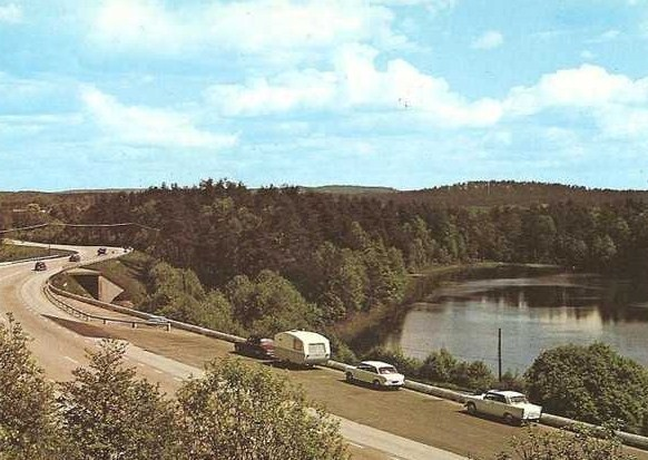 Inscannad del av vykort 1973 Y. Almqvist Förlag: Jonnys Allbutik, Åsljunga